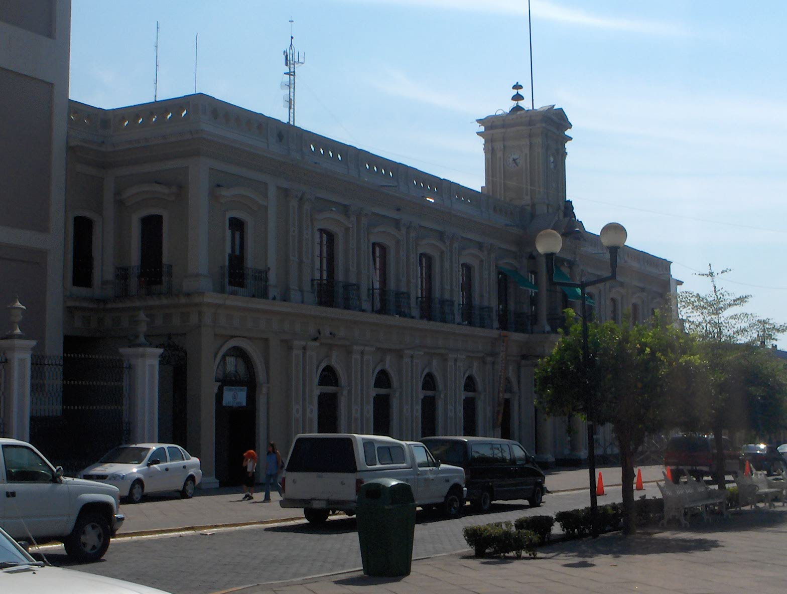 Palacio de Presidente Colima / Mexico